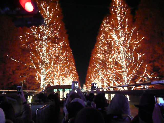 ローム・イルミネーション、きれい！